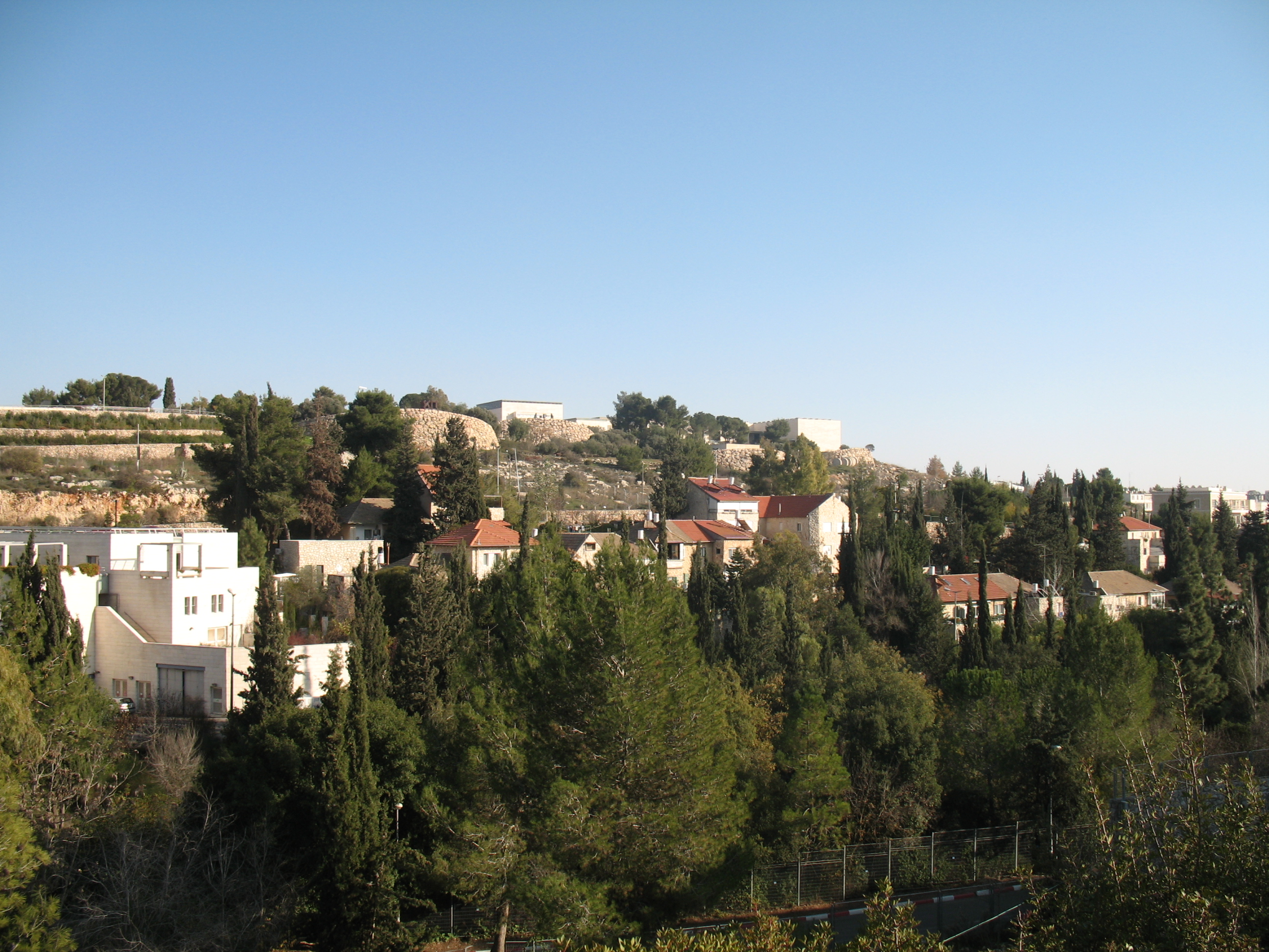 שכונת נווה שאנן, מבט מגבעת רם. ברקע מוזיאון ישראל רישיון נוצר על ידי משתמש:Adiel lo